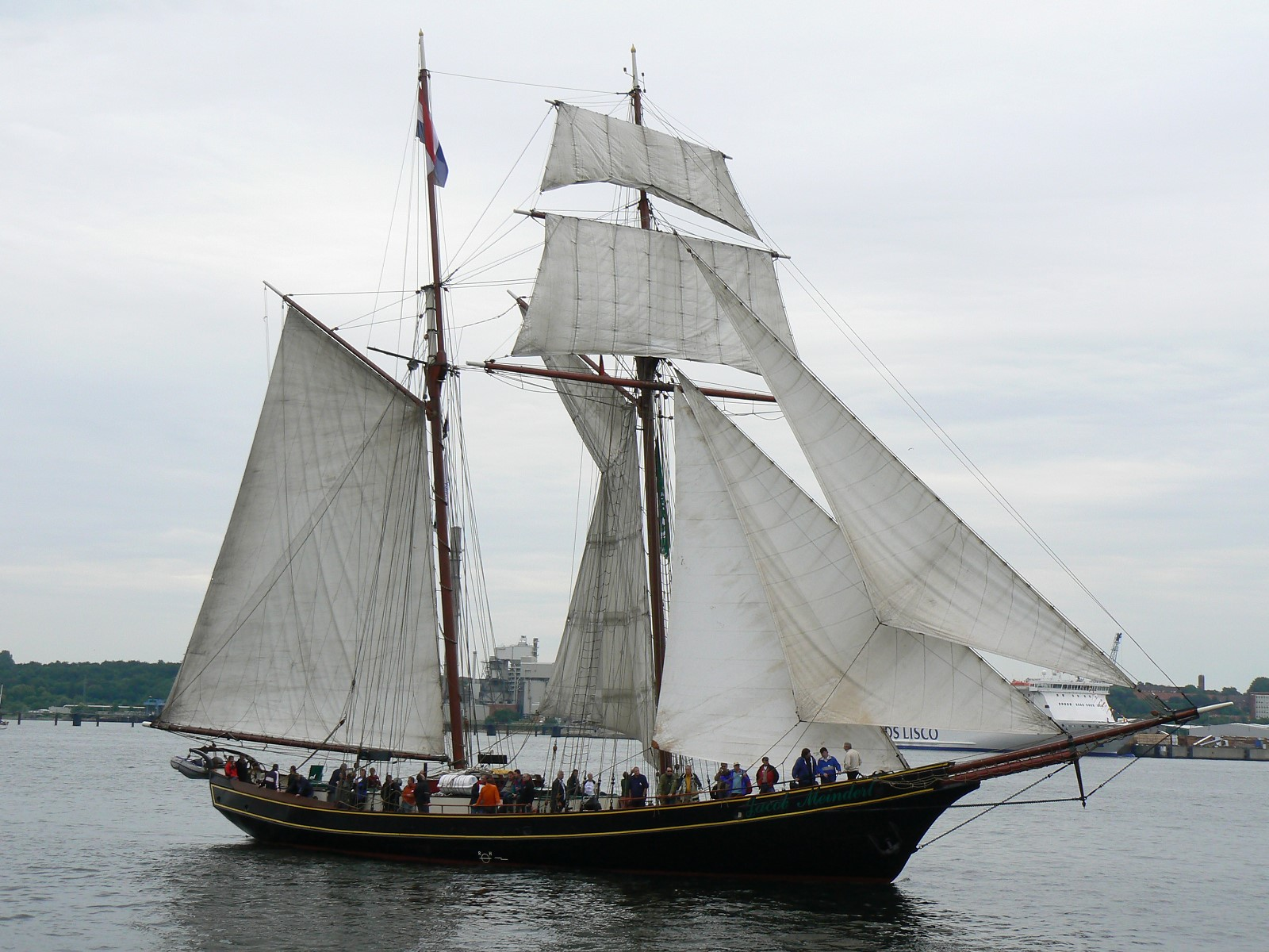 Segelschiff (Topsegelschoner) Jacob Meindert auf der Kieler Woche 2007.